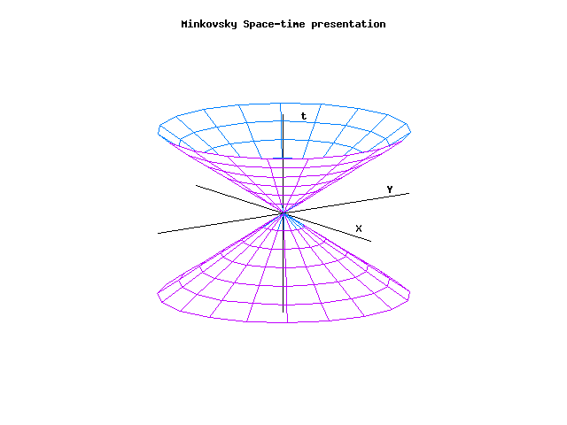 Това е графичен файл, който аз изработих за Уикипедия за онагледяване на статия. Ползвал съм за изработката му GNUplot.